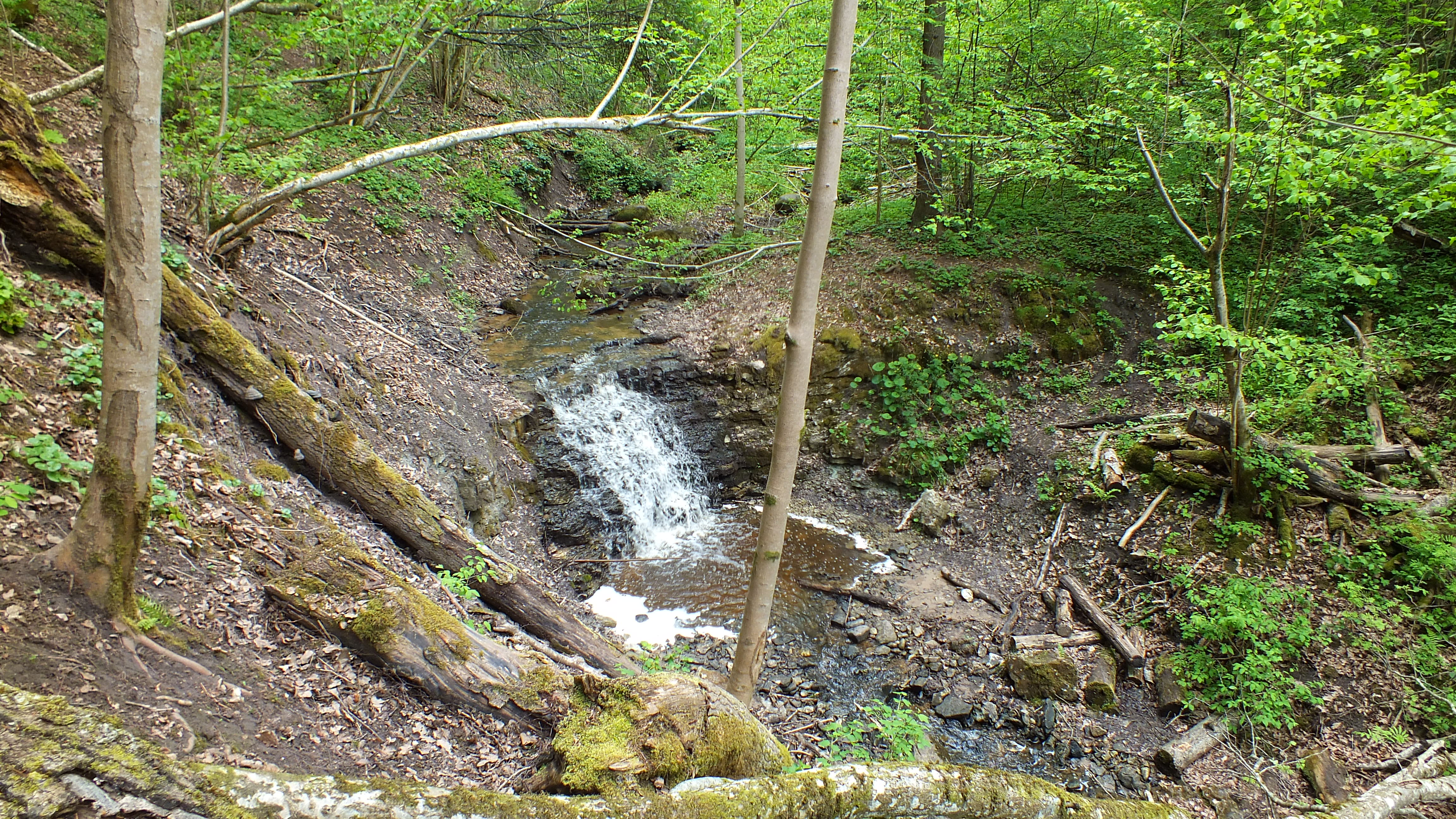 Virsaišu ūdenskritums (2)